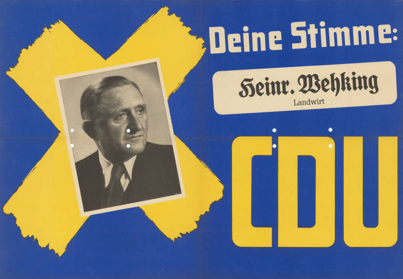 Deine Stimme: Heinr. Wehking Landwirt CDU Abbildung: Porträt-Foto - Stimmkreuz Plakatart: Kandidaten-/Personenplakat mit Porträt Objekt-Signatur: 10-009 : 199 Bestand: Landtagswahlplakate Nordrhein-Westfalen (10-009) GliederungBestand10-18: Landtagswahlplakate Nordrhein-Westfalen (10-009) » Landtagswahl am 18.6.1950 » CDU » mit Porträtfoto Lizenz: KAS/ACDP 10-009 : 199 CC-BY-SA 3.0 DE